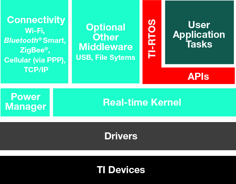 Esquema de l'arquitectura que segueix TI-RTOS